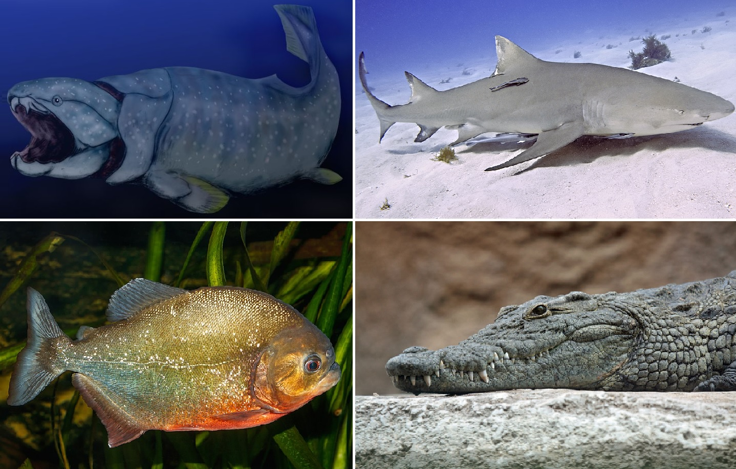 File based on